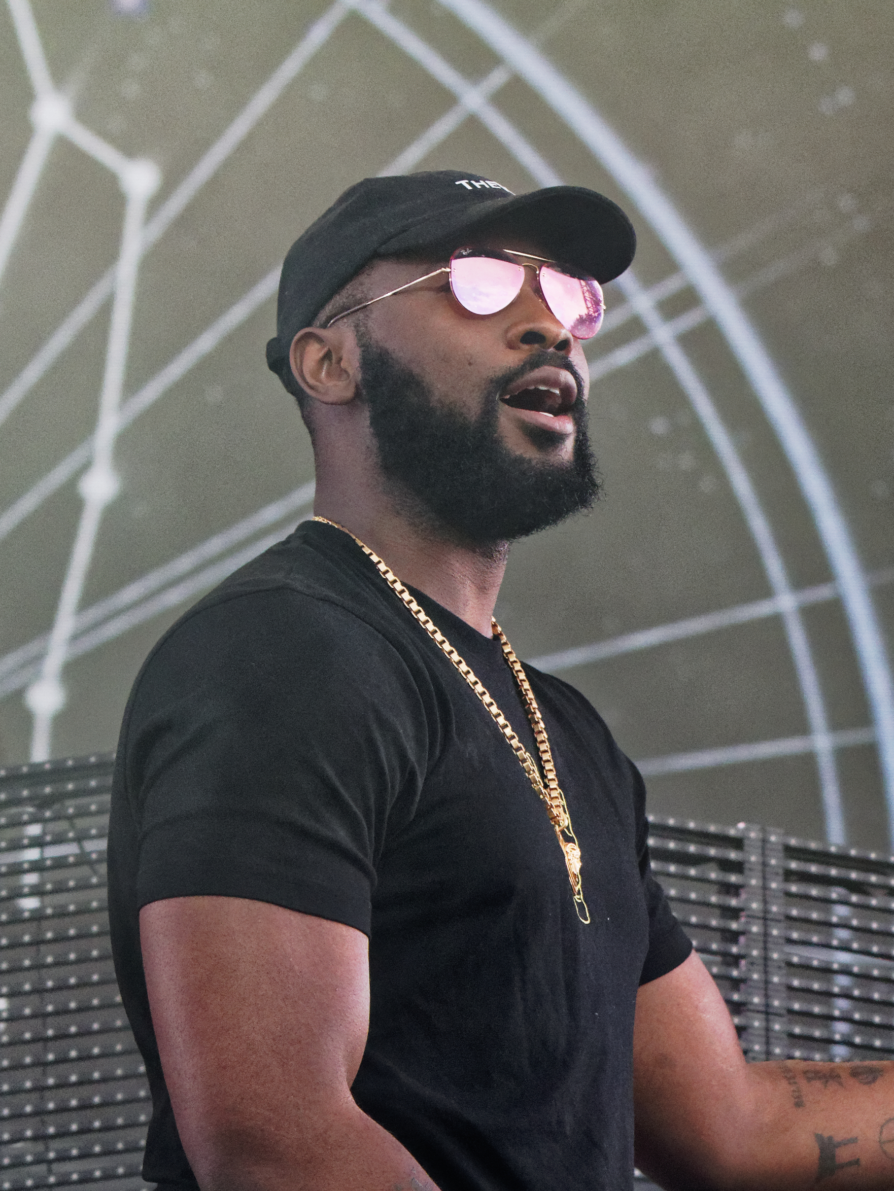 Damso en concert lors du festival des vieilles charrues 2018.